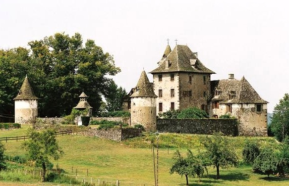 Château de Vixouze, Polminhac (15),vue générale.